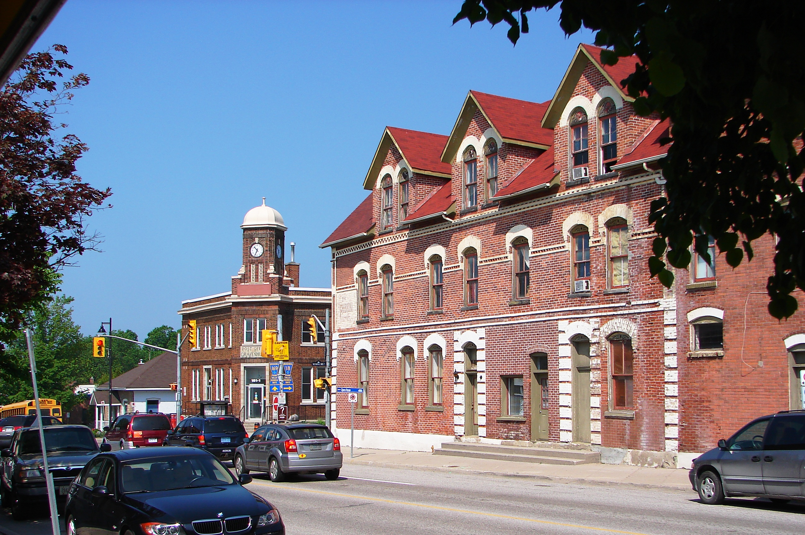 Gravenhurst, Ontario, Canada